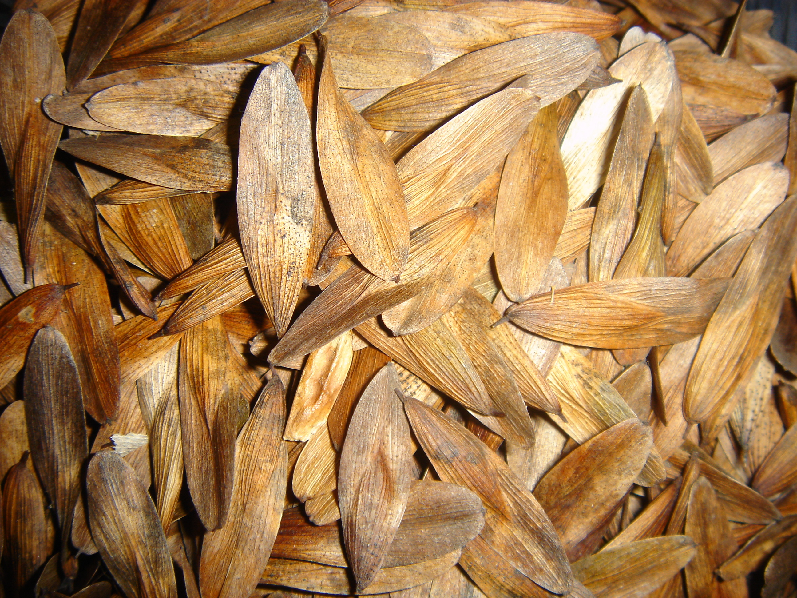 Kafkas dişbudağı (Fraxinus angustifolia subsp. oxycarpa)